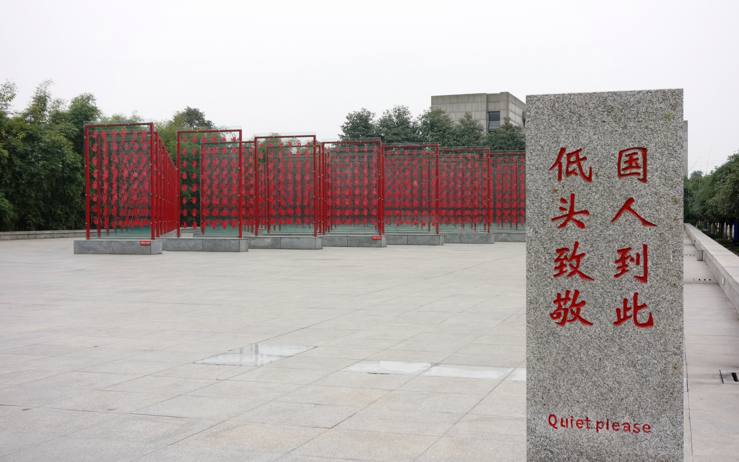 建川博物馆聚落抗战老兵手印广场，在庆祝抗战胜利60周年征集抗战老兵的手印，目前，共征集到5000余名抗战老兵的手模。